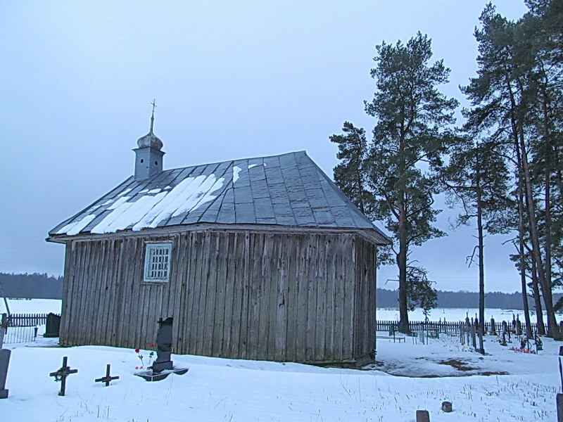 Ятаўтавічы. Капліца